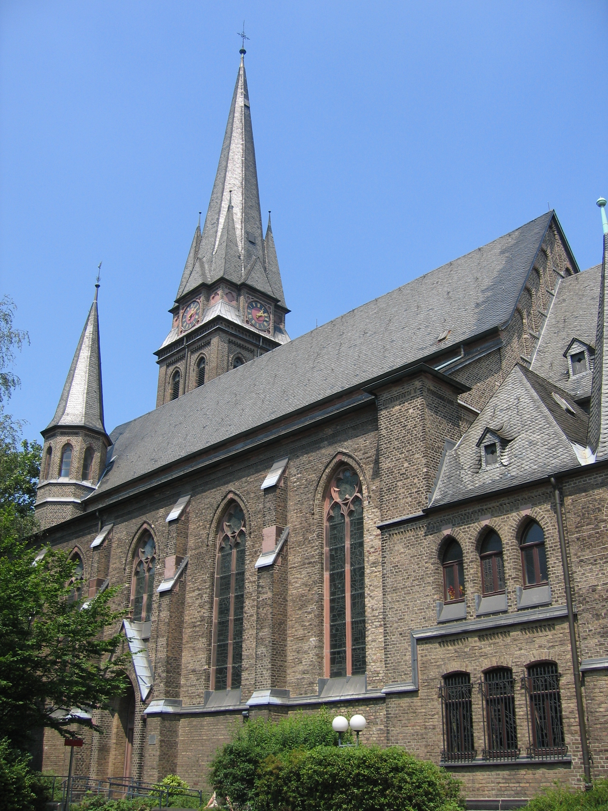 Kirche St.Mauritius in Köln-BuchheimThis is a photograph of an architectural monument.